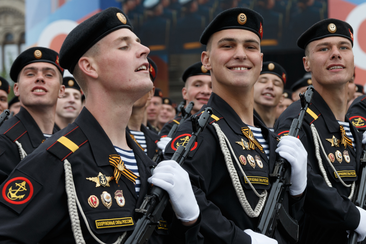 В Москве прошел парад в честь 74-й годовщины Победы в Великой Отечественной войне